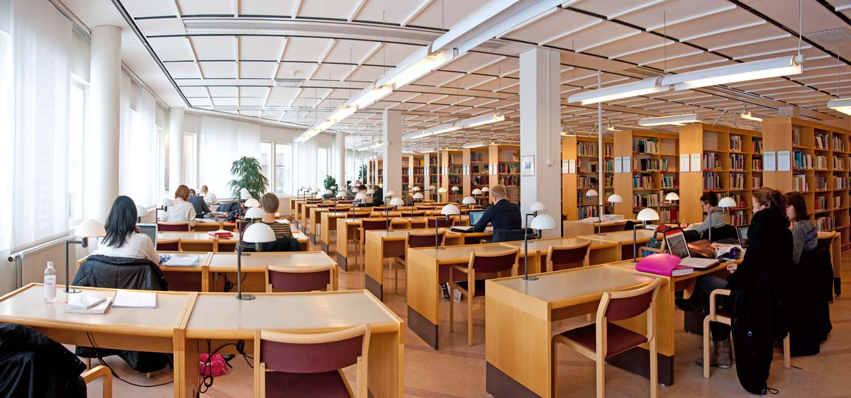 Linköpings universitetsbibliotek, Hälsouniversitetets biblioteket, Hälsouniversitetet, Campus US, Linköping